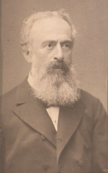 Holsten, Carl (Christian Johann)